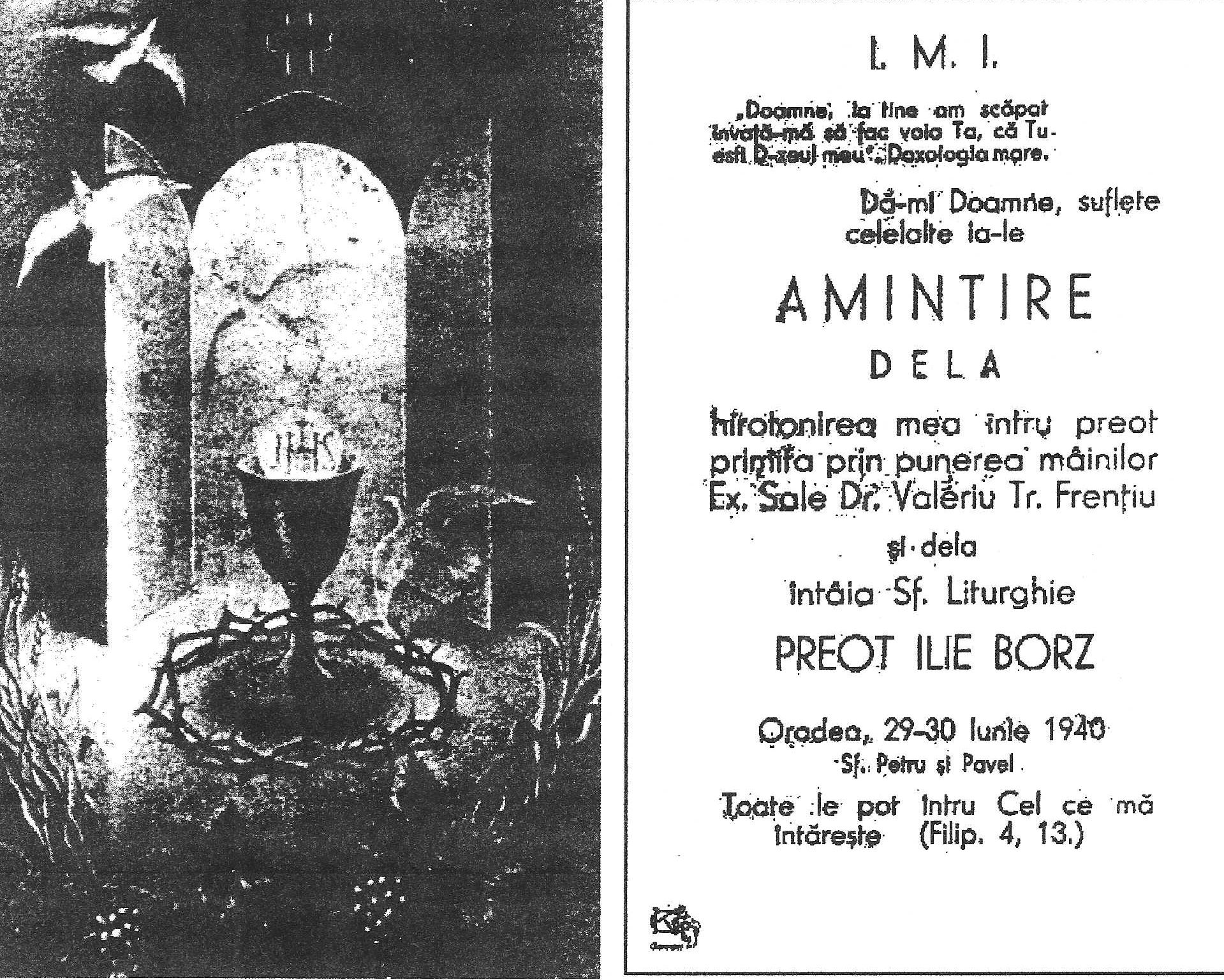 Iconița primită ca amintire de către preotul Ilie BORZ la hirotonirea sa de către IPS Dr. Valeriu FRENȚIU - Episcop de Oradea (29-30 iunie 1940)